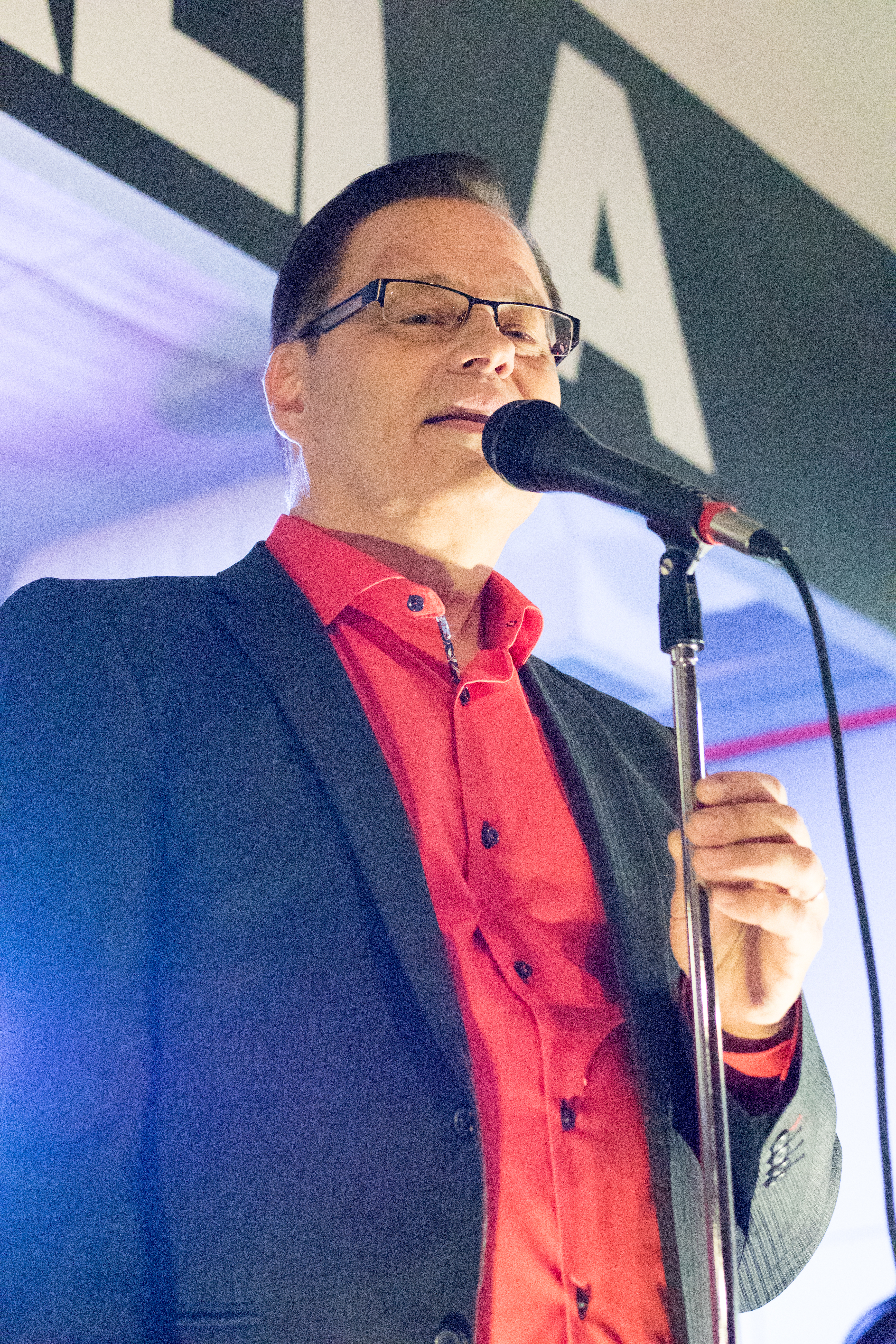 Juha Vartiainen suomalainen iskelmälaulaja